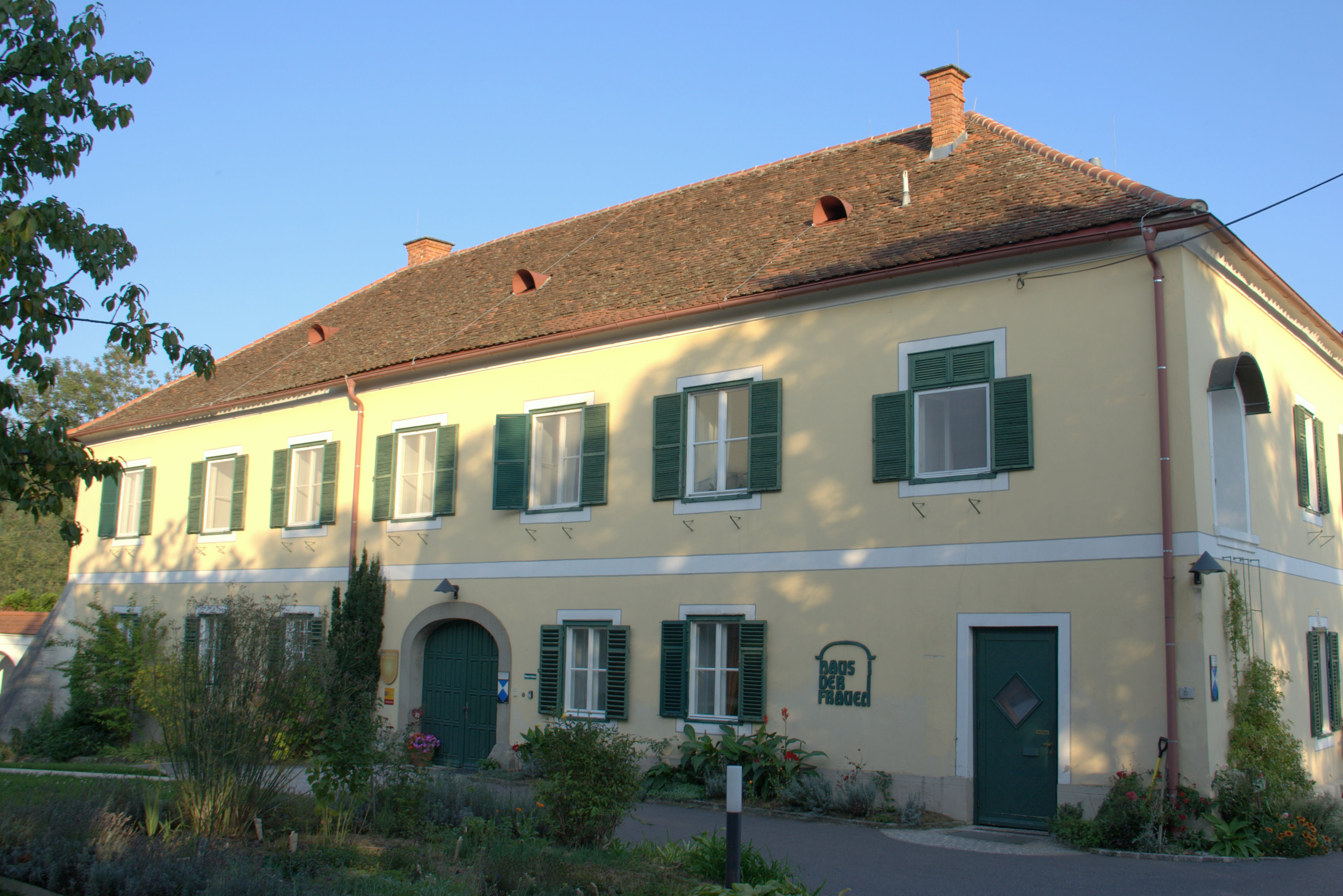 Pfarrhof, ehem. Kloster, Haus der Frauen